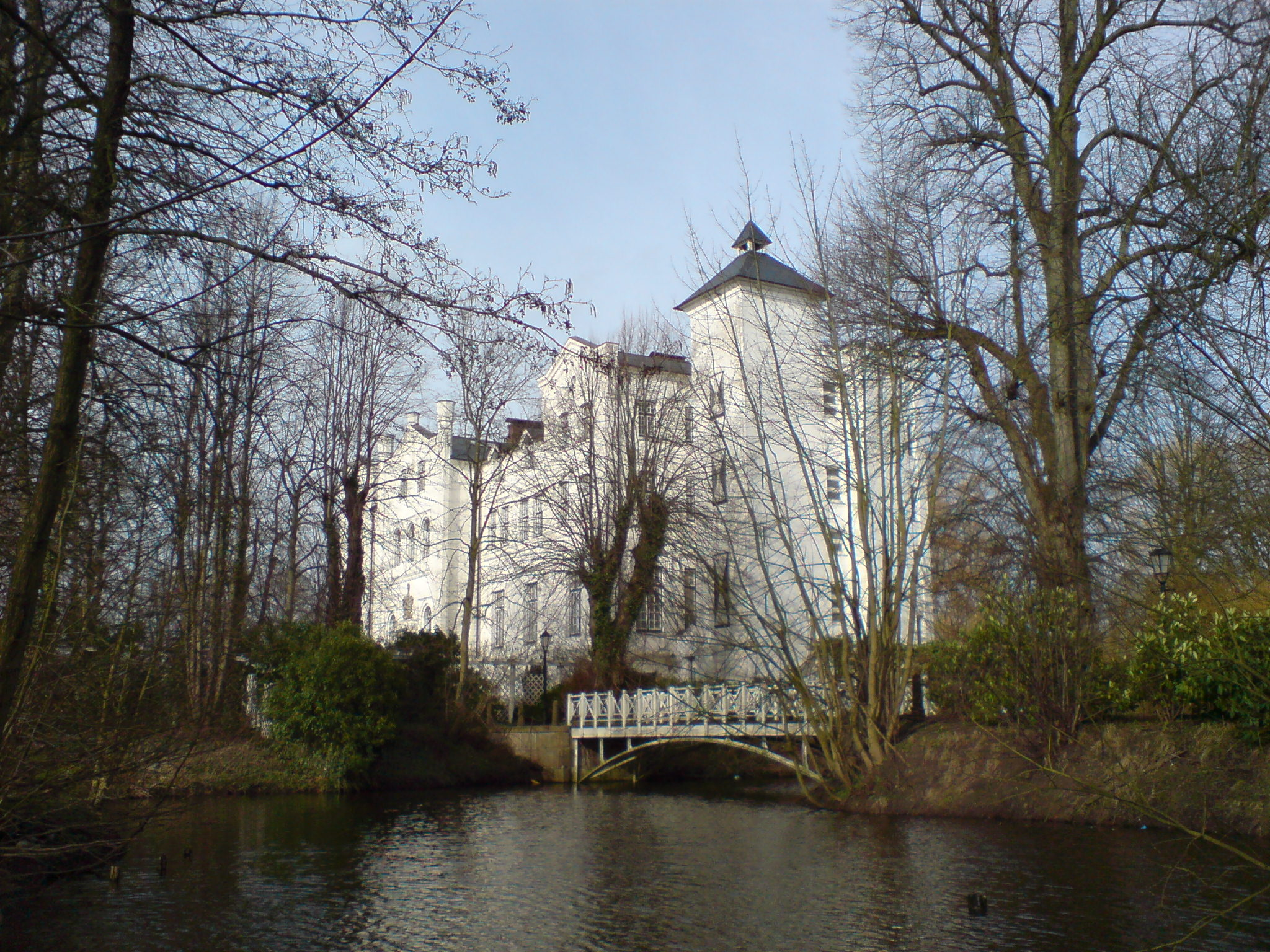 Heiligenstedten, Blick durch den Park